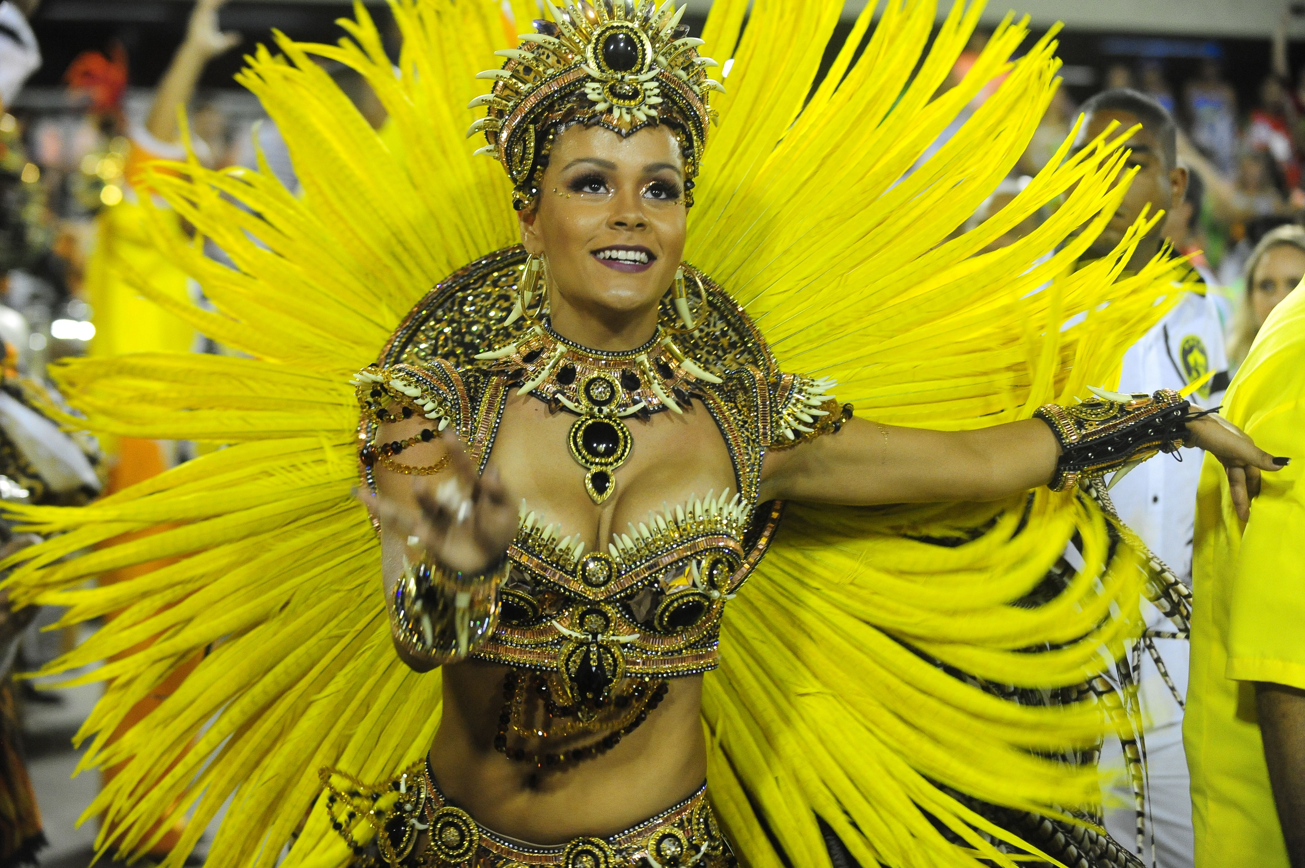 Segundo dia de desfile do Grupo Especial das Escolas de Samba do Carnaval 2015. Na avenida, a escola São Clemente (Tânia Rêgo/Agência Brasil)